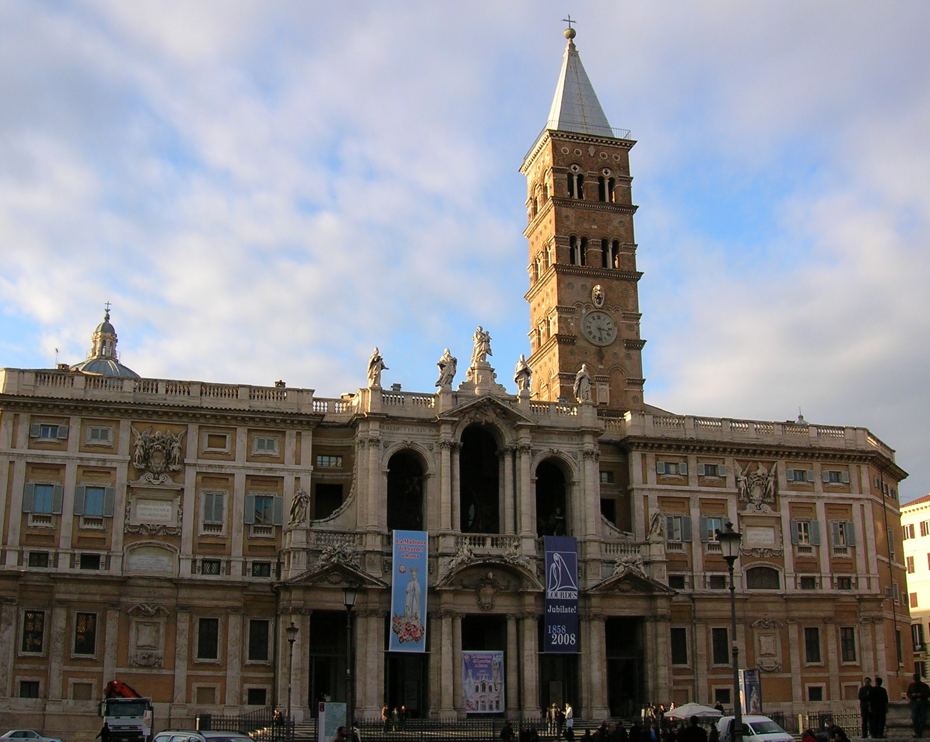 Vue de face de la Basilique Sainte-Marie Majeure de Rome (Santa-Maria Maggiore)